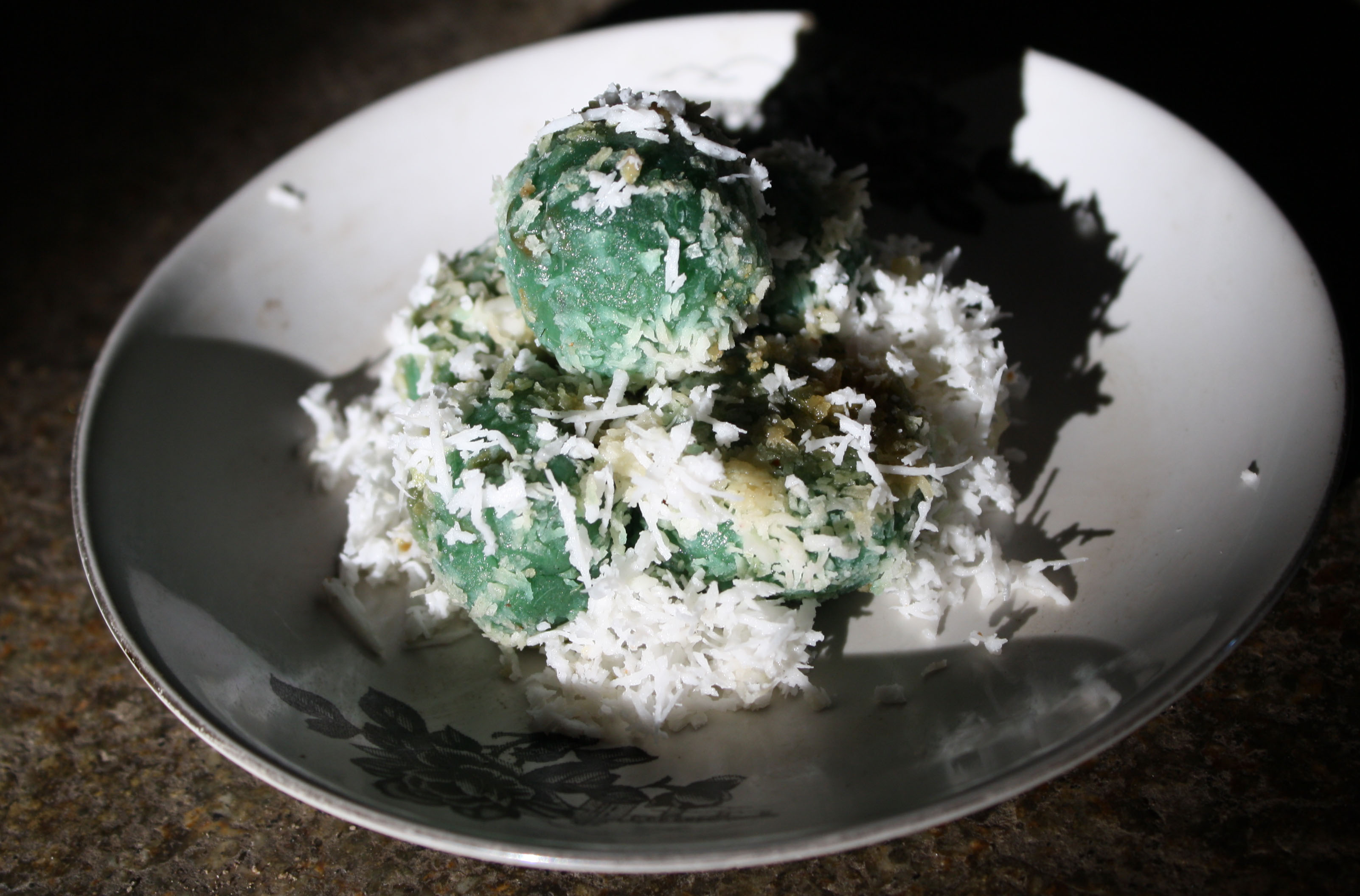 Klepon makanan dari Jawa Tengah Indonesia